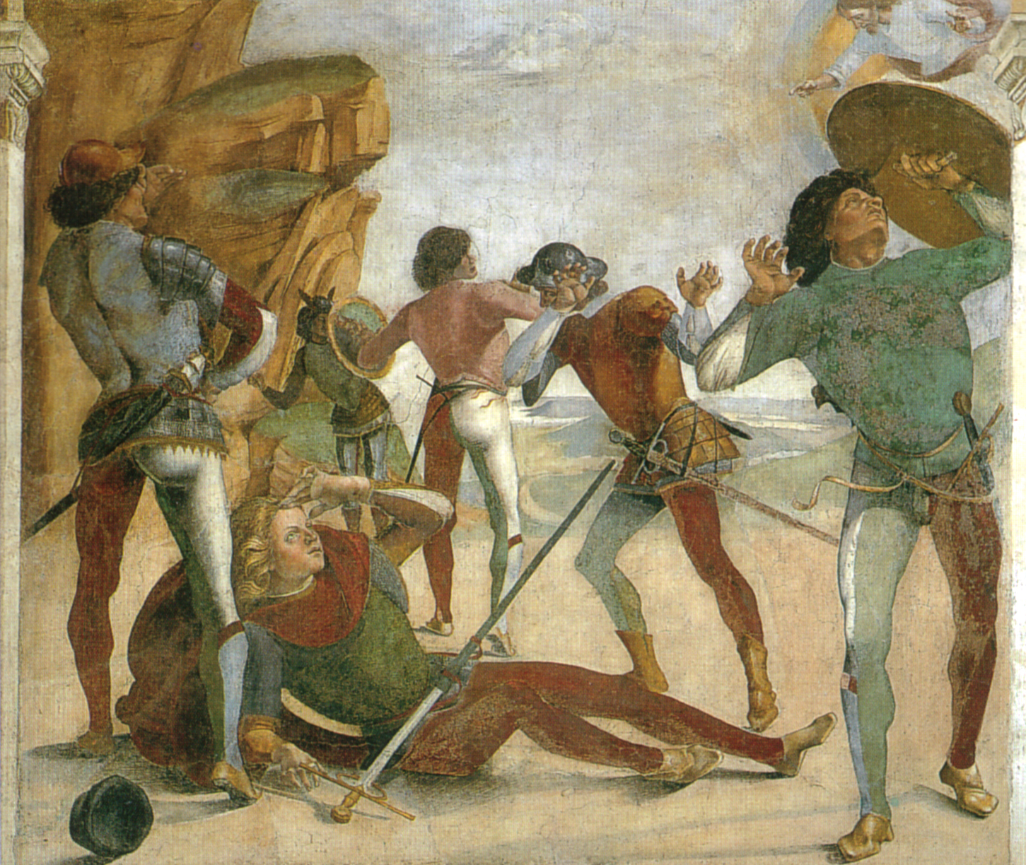 Luca signorelli, loreto, sagrestia della cura, conversione di san paolo